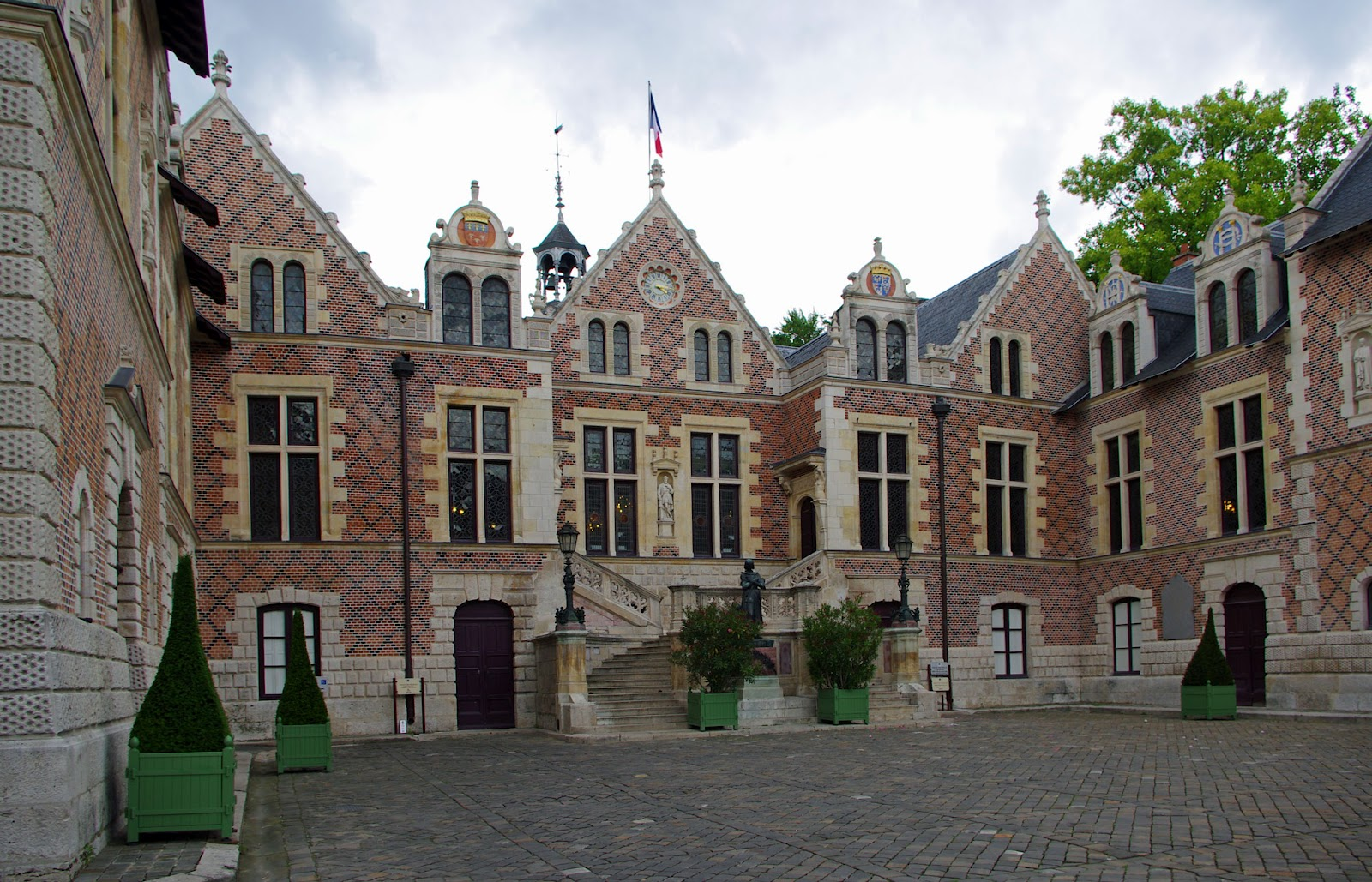 Hôtel Groslot, Orléans, France, 2012